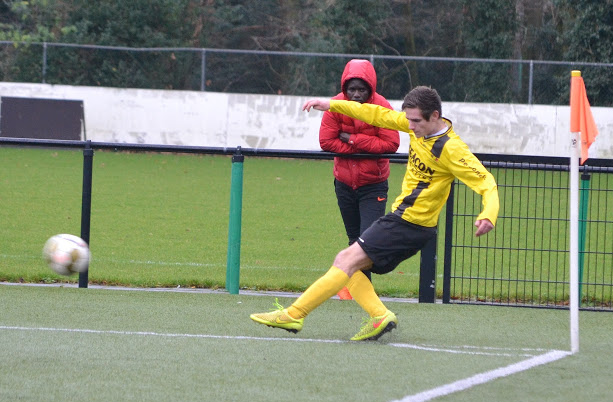 Wietse van Lankveld